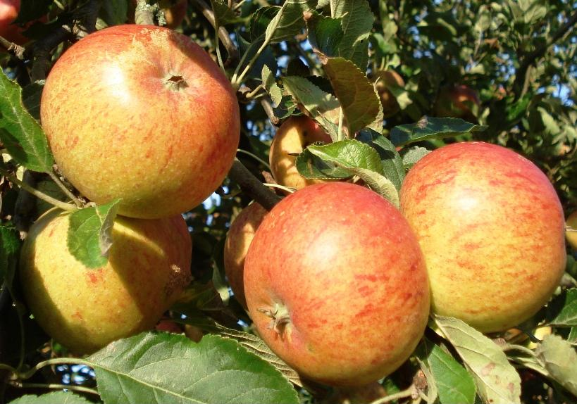 Äpfel der Sorte Cox-Orange am Baum